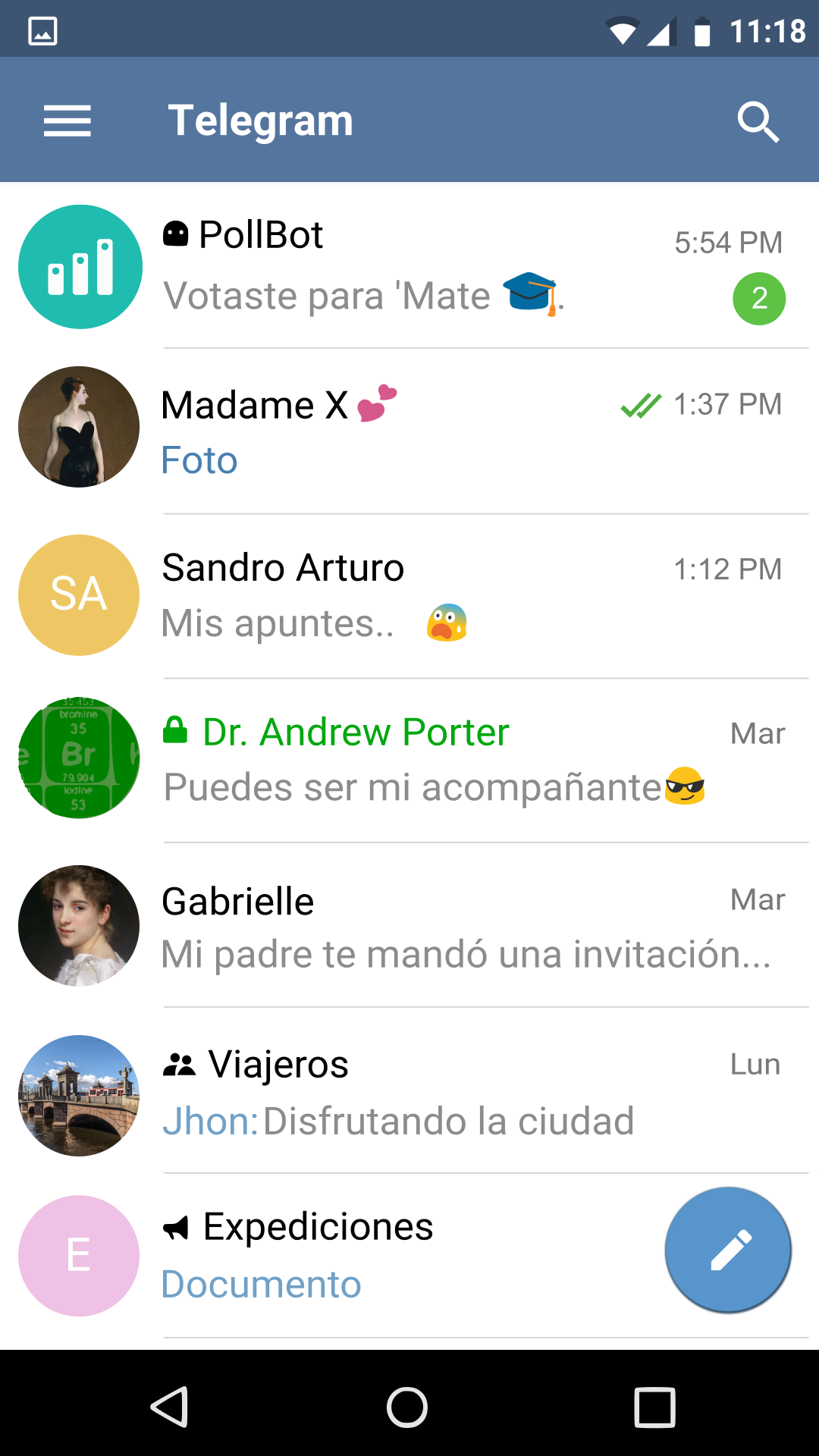 Captura de pantalla de Telegram para Android en español. Esta versión ha sido parcialmente vectorizado y derivado de File:Telegram Android screenshot v3.3.svg.. Contiene texto basado en la fuente Roboto para realizar escalas, Emojis del proyecto Noto e imágenes de Wikimedia Commons.